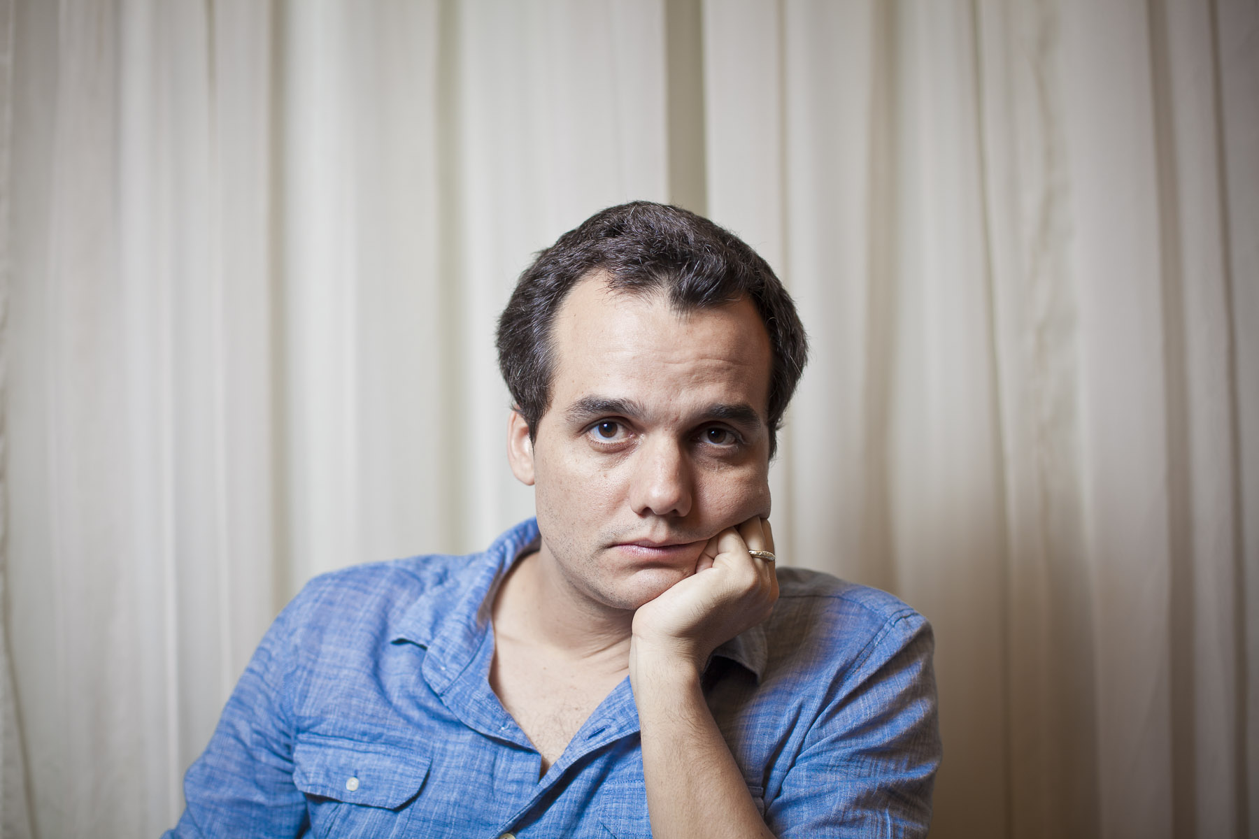 SÃO PAULO, SP, BRASIL, 04-03-2013: O ator Wagner Moura, em retrato no hotel Caesar Business Paulista onde atendeu a imprensa para falar da estreia do filme 'A Busca'. (Foto: Zé Carlos Barretta/Folhapress ILUSTRADA)